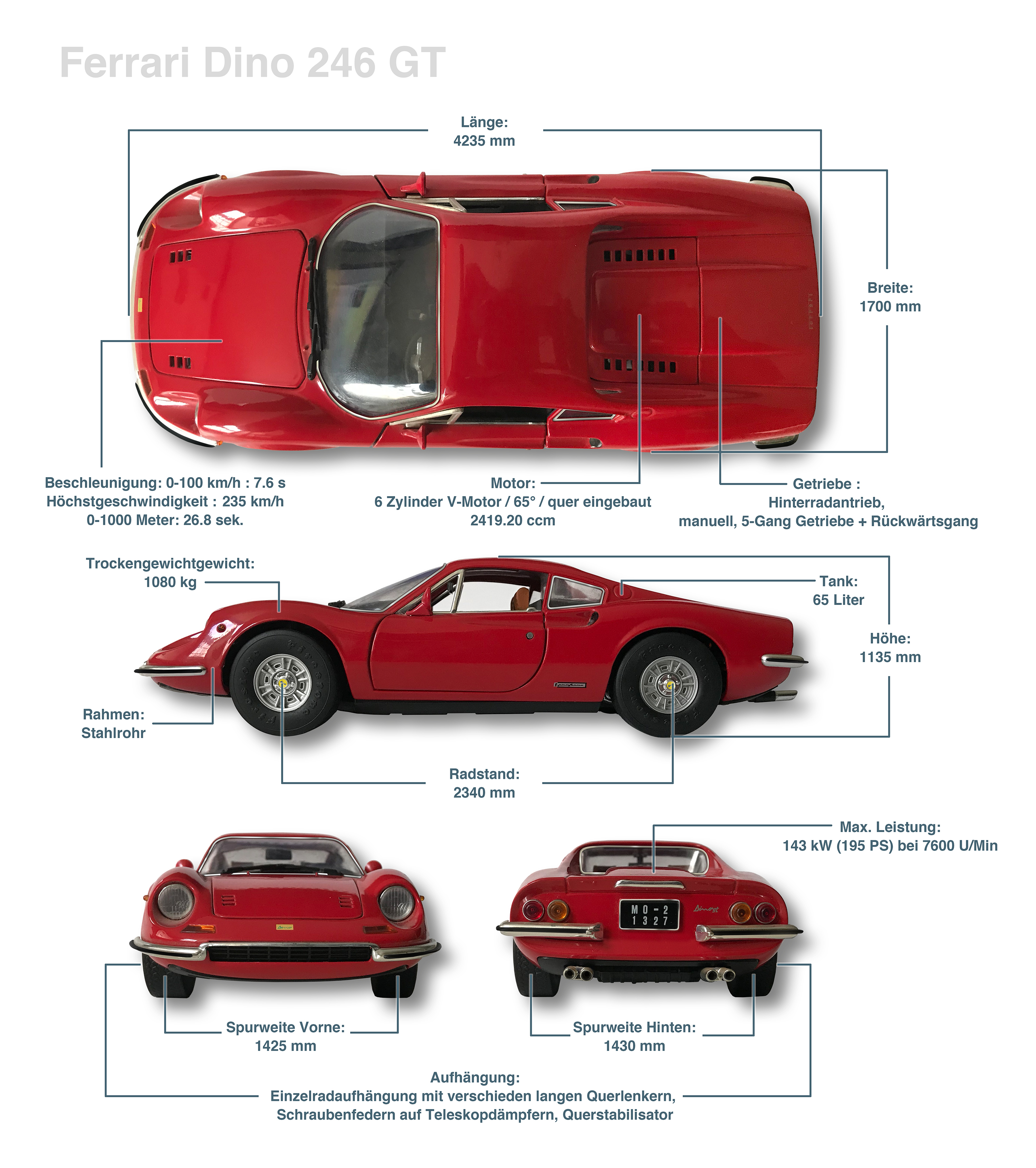 Grafisch aufbereitete Basis-Informationen zum Ferrari Dino 246 GT